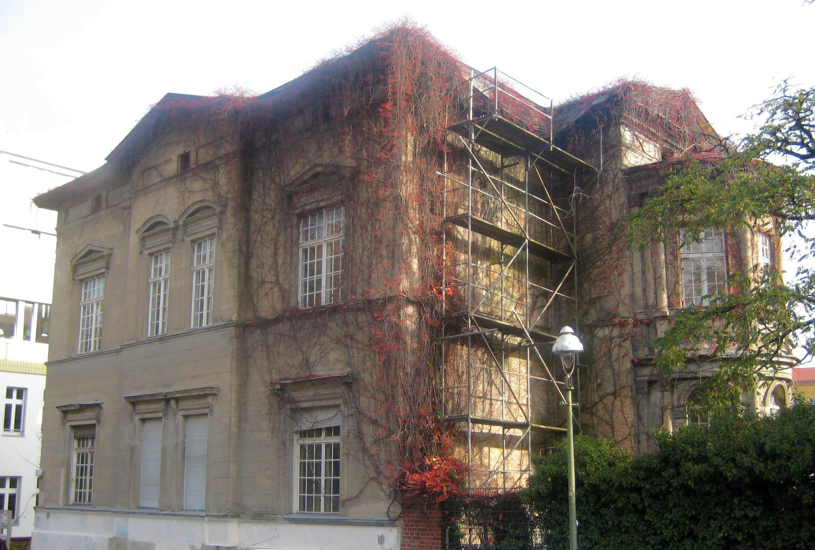 das denkmalgeschützte Haus Lindenberg, Methfesselstraße 23-25 in Berlin-Kreuzberg; errichtet von Architekt E. Becher 1874 /the landmarked Haus Lindenberg, Methfesselstraße 23-25 in Kreuzberg, Berlin; built in 1874 by architect E. Becher.